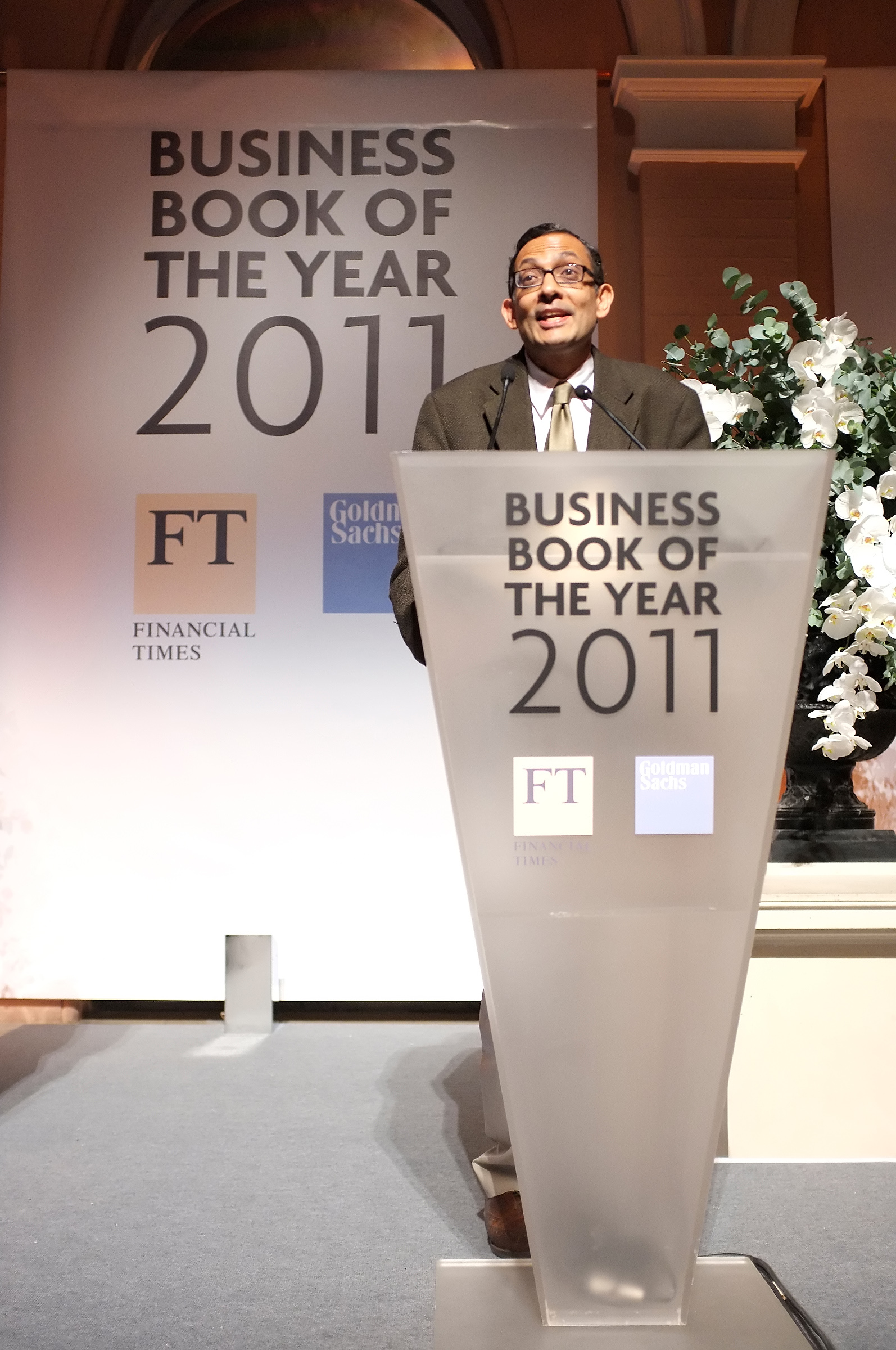 Mr Abhijit V. Banerjee, winning Author